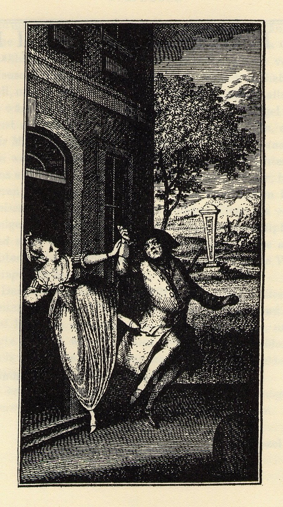 Titelbild zum ersten Teil von Johann Karl Wezel: Belphegor oder die wahrscheinlichste Geschichte unter der Sonne. Akante wirft Belphegor aus ihrem Haus